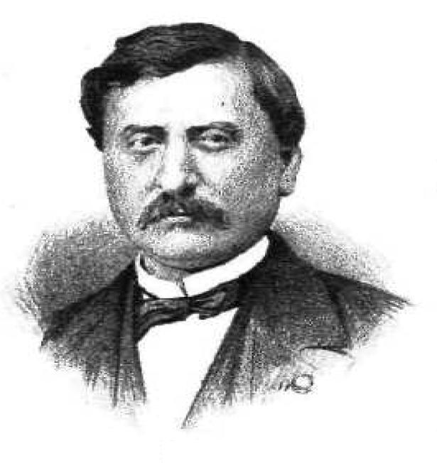 Griechischer Politiker, 19. Jahrhundert